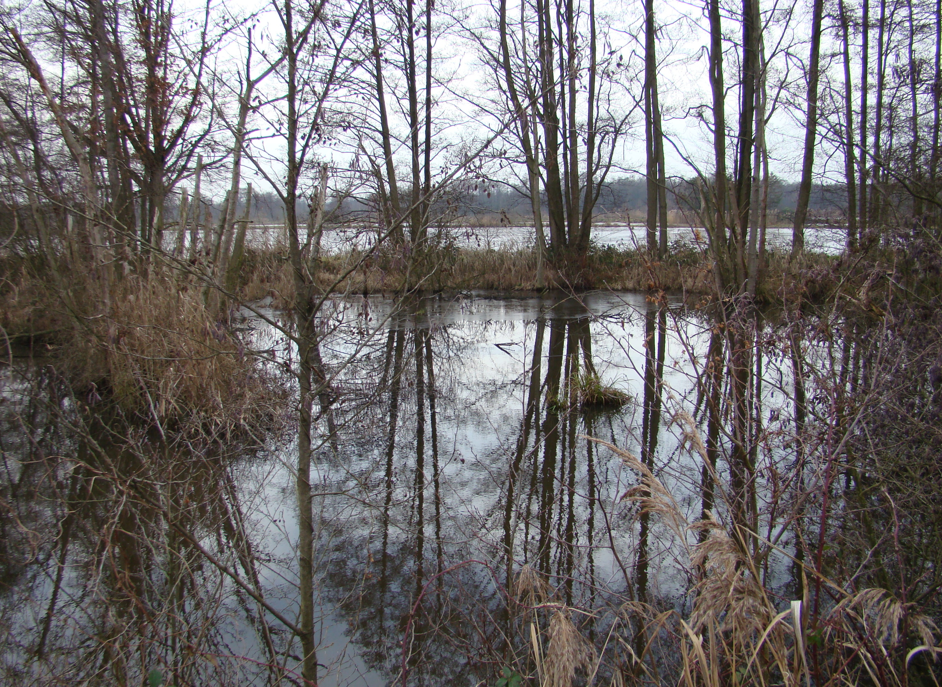 Teichfläche im NSG mit Erlenbruch Pond in the nature reserve with alder grove, Meißendorf, Lower Saxony, Germany.